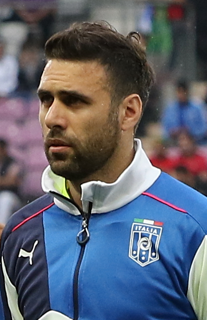 20150616 - Portugal - Italie - Genève - Salvatore Sirigu